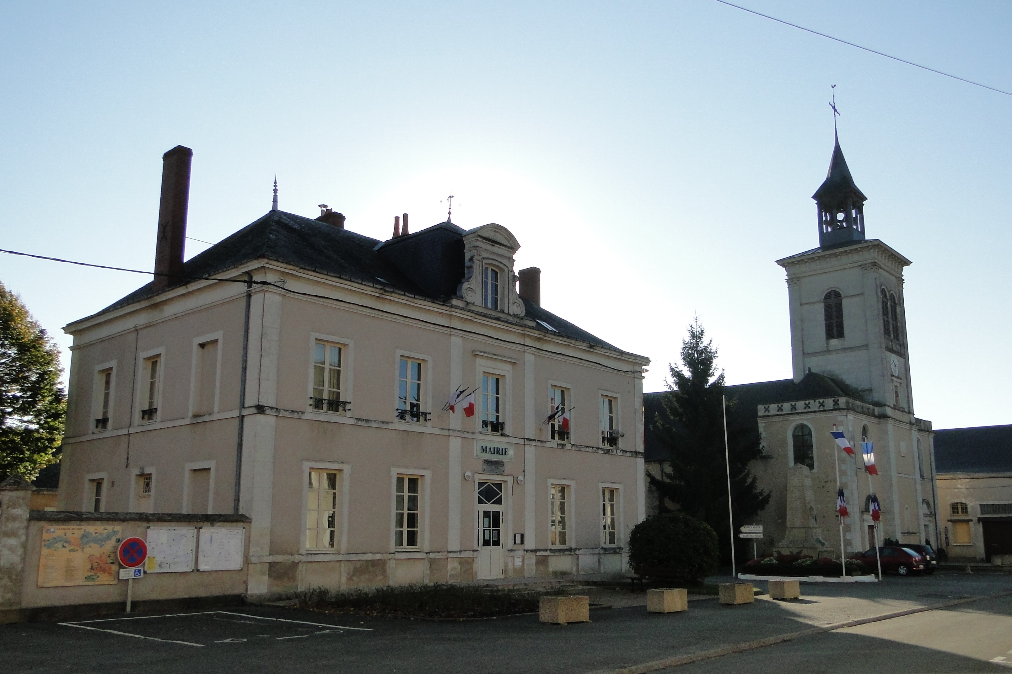 Mairie de Pontvallain avec vue sur l'église Saint-Pierre-et-Saint-Paul (Sarthe)